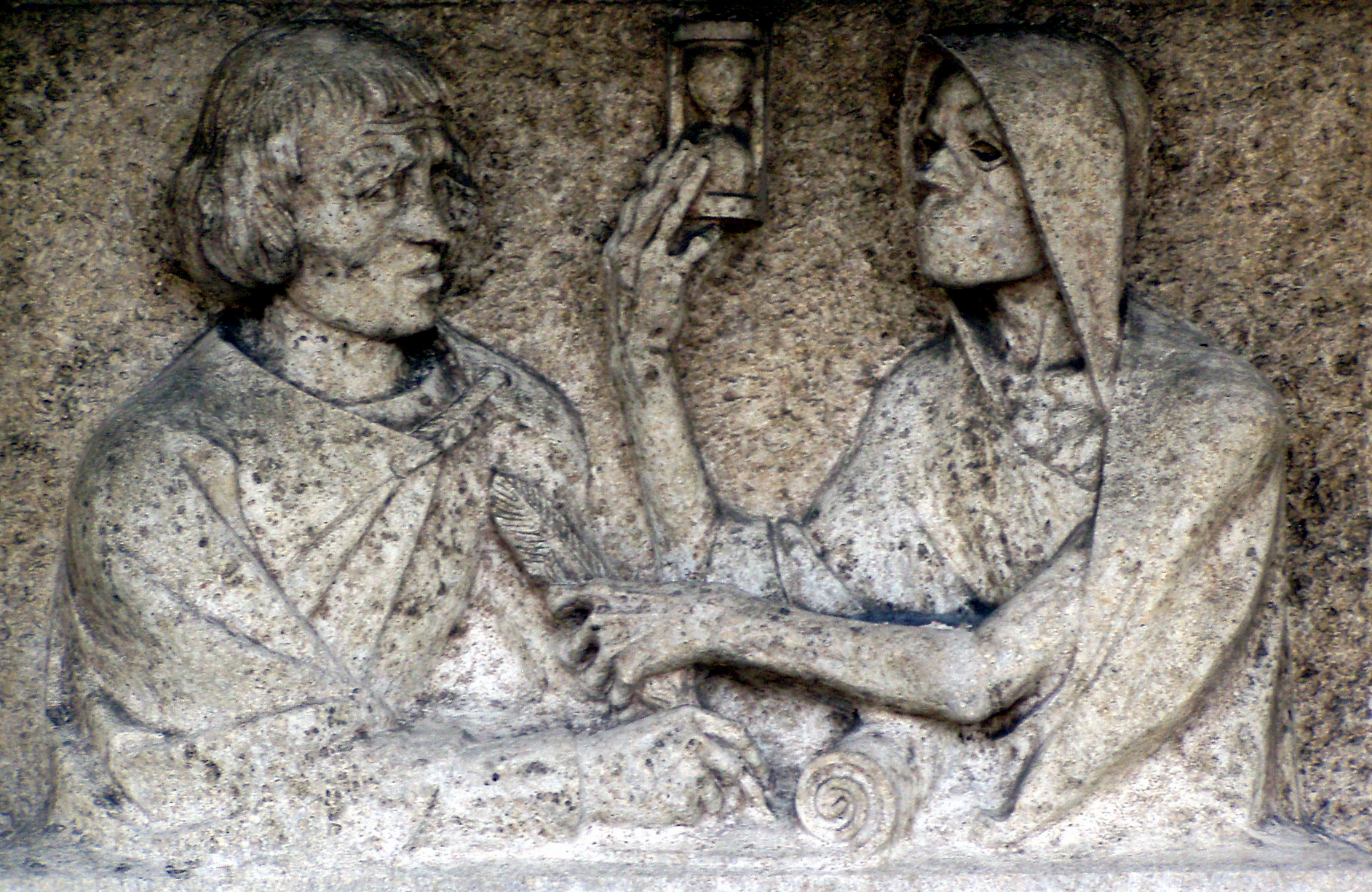 Grabsteinplatte von Richard Rother, Alter Friedhof Kitzingen